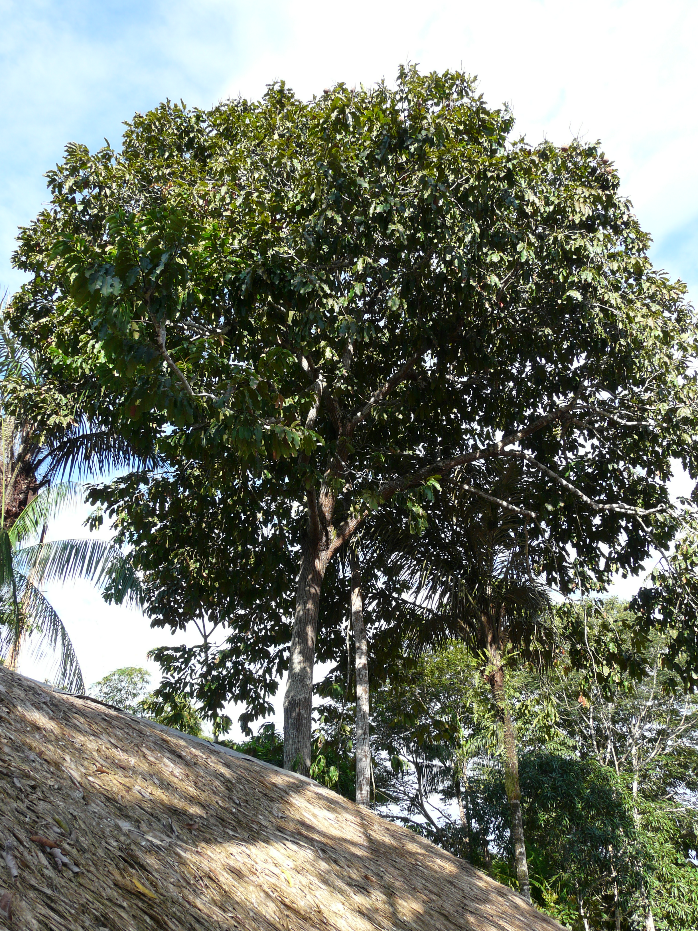 Noor parapähklipuu (Bertholletia excelsa). Rio Negro, Amasoonia, mai algus.